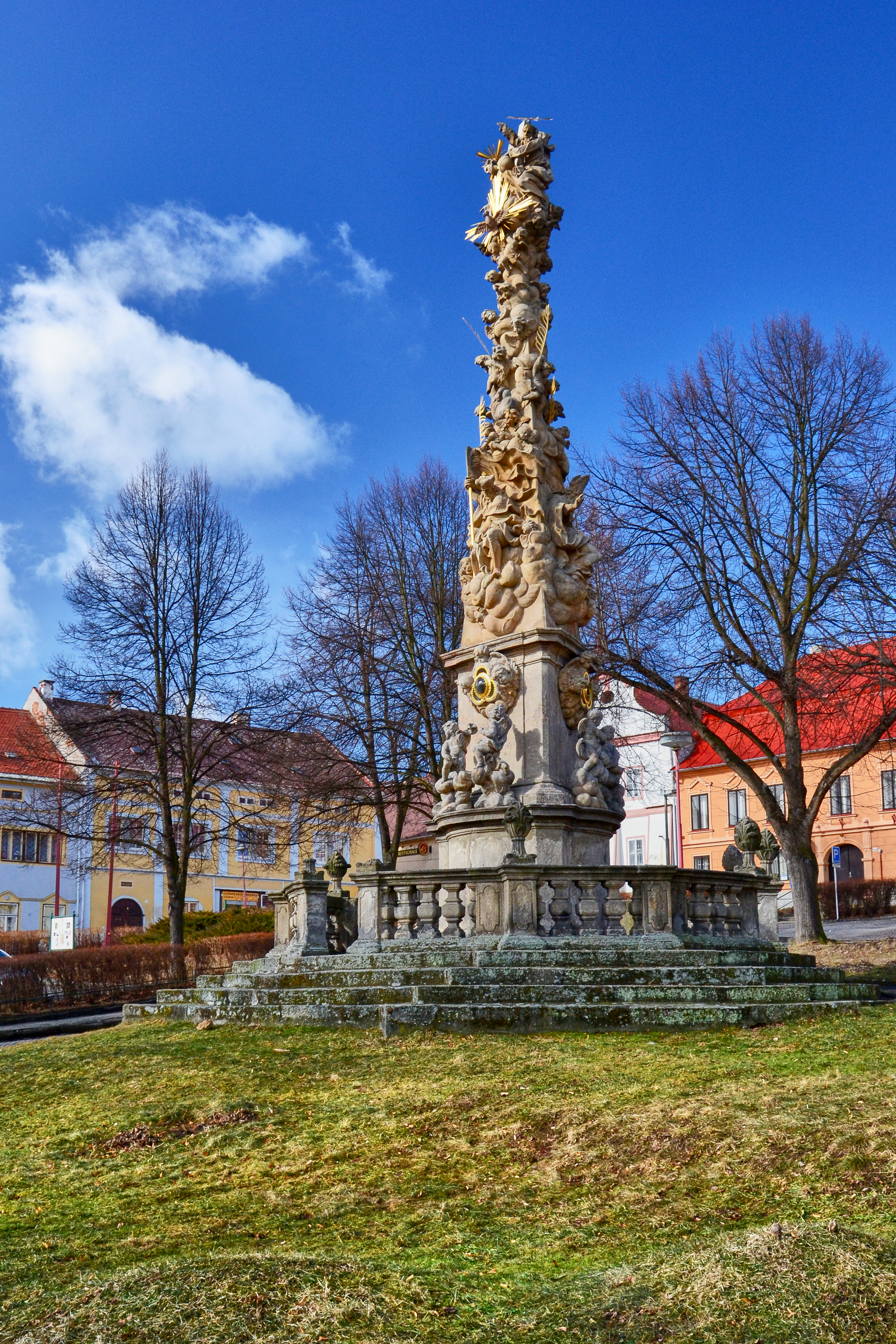 Sloup se sousoším Nejsvětější Trojice (Žlutice), náměstí, Žlutice